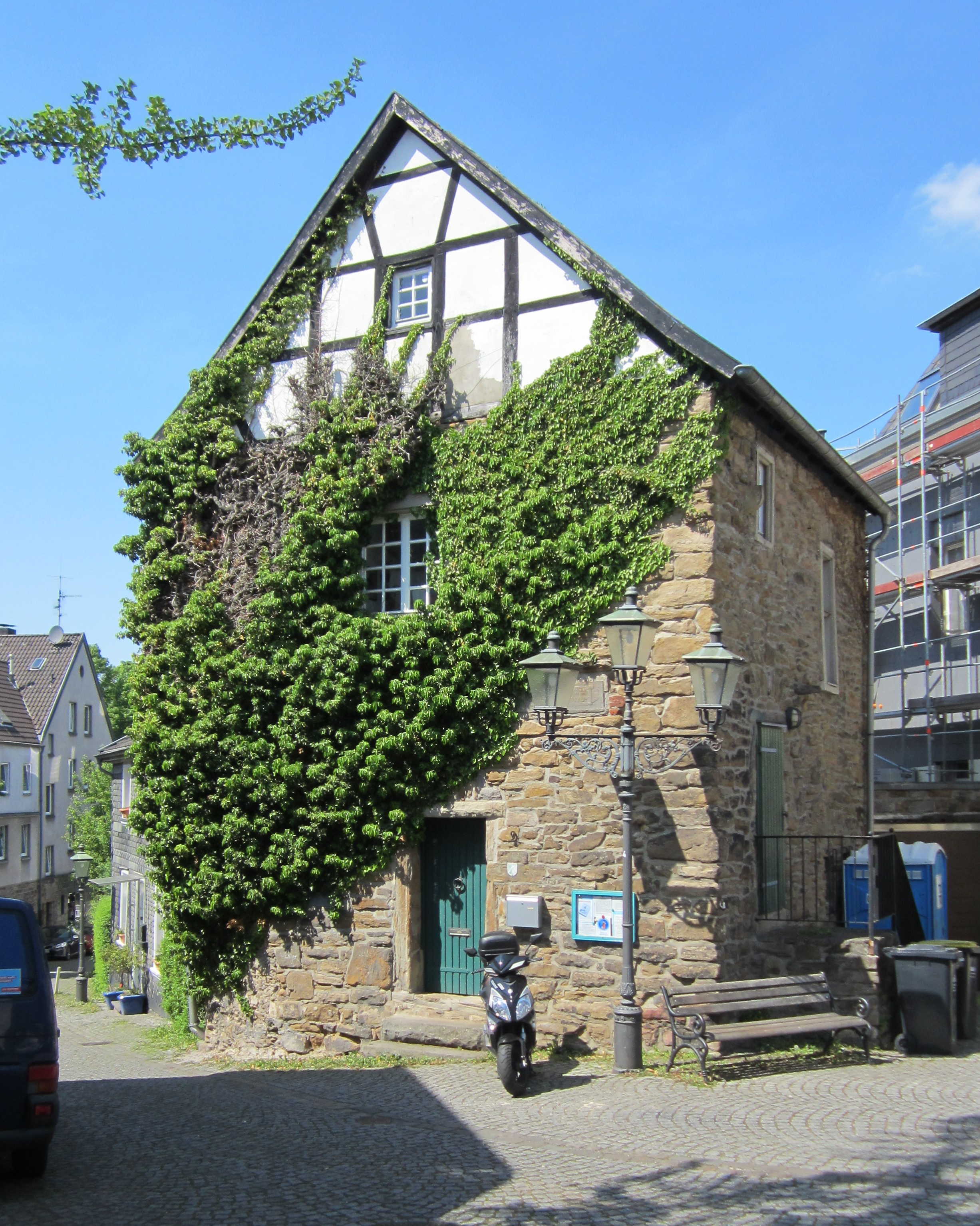 Blücherturm in Essen-Rellinghausen, Am Stift 9